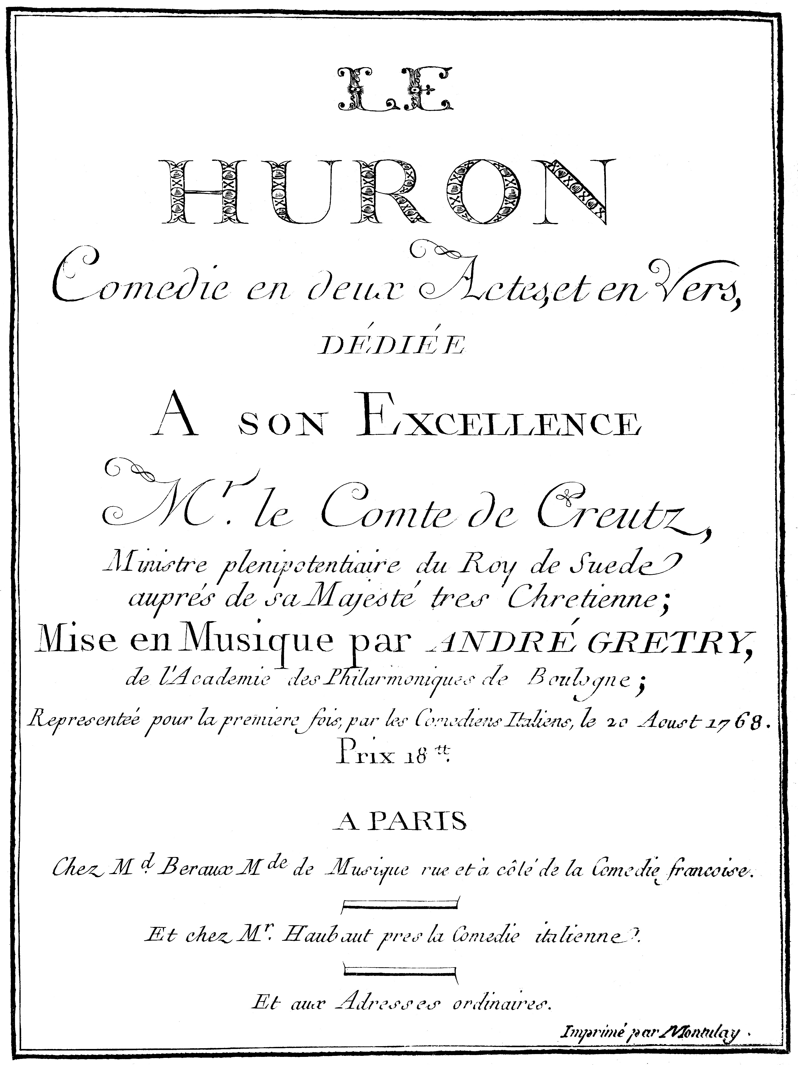 André-Ernest-Modeste Grétry (1741–1813): Titelblatt der gedruckten Partitur seines erfolgreichen Pariser Erstlings, der Opéra-comique "Le Huron" ("Der Hurone"). Libretto: Jean-François Marmontel (1723–1799), nach Voltaire. Uraufführung: Comédie-Italienne, 20. August 1768. Bibliothèque nationale de France.